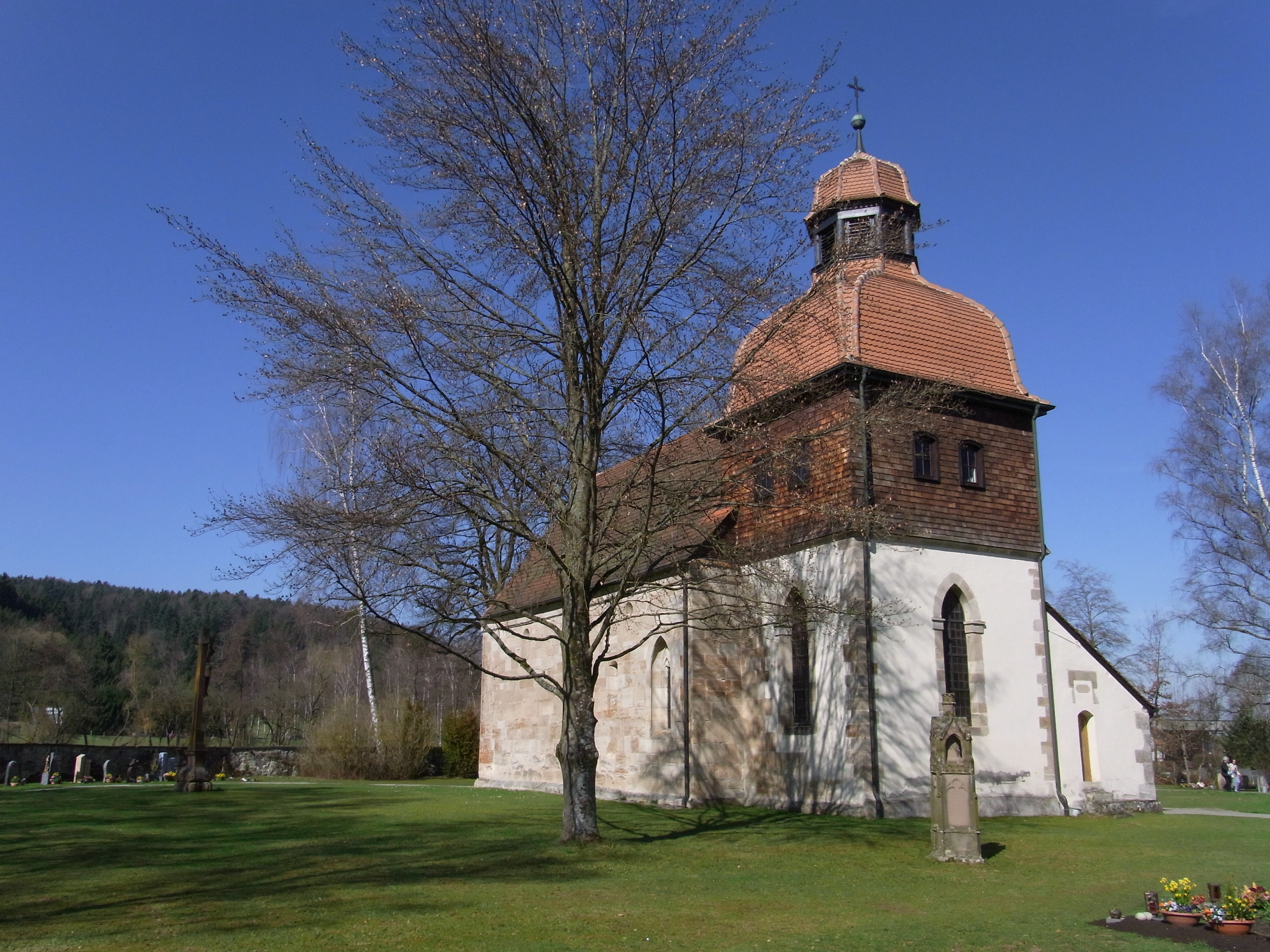 Owingen: Weilerkirche